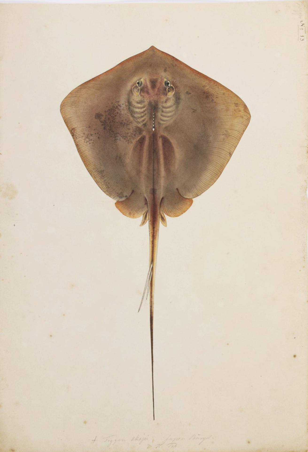 Hemitrygon akajei (Müller & Henle, 1841)